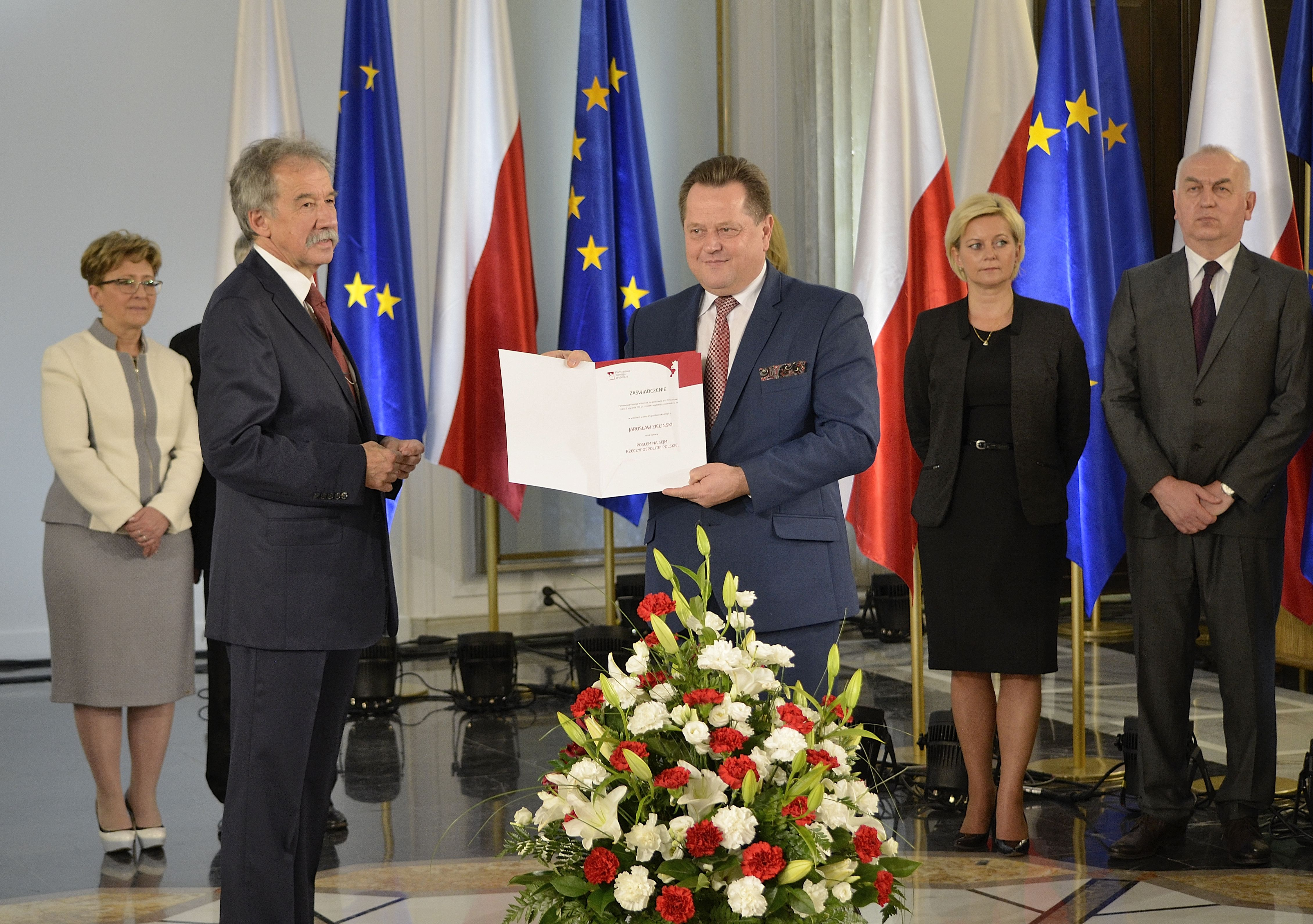 Poseł Jarosław Zieliński podczas uroczystości wręczenia zaświadczeń o wyborze nowo wybranym posłom w Sali Kolumnowej Sejmu